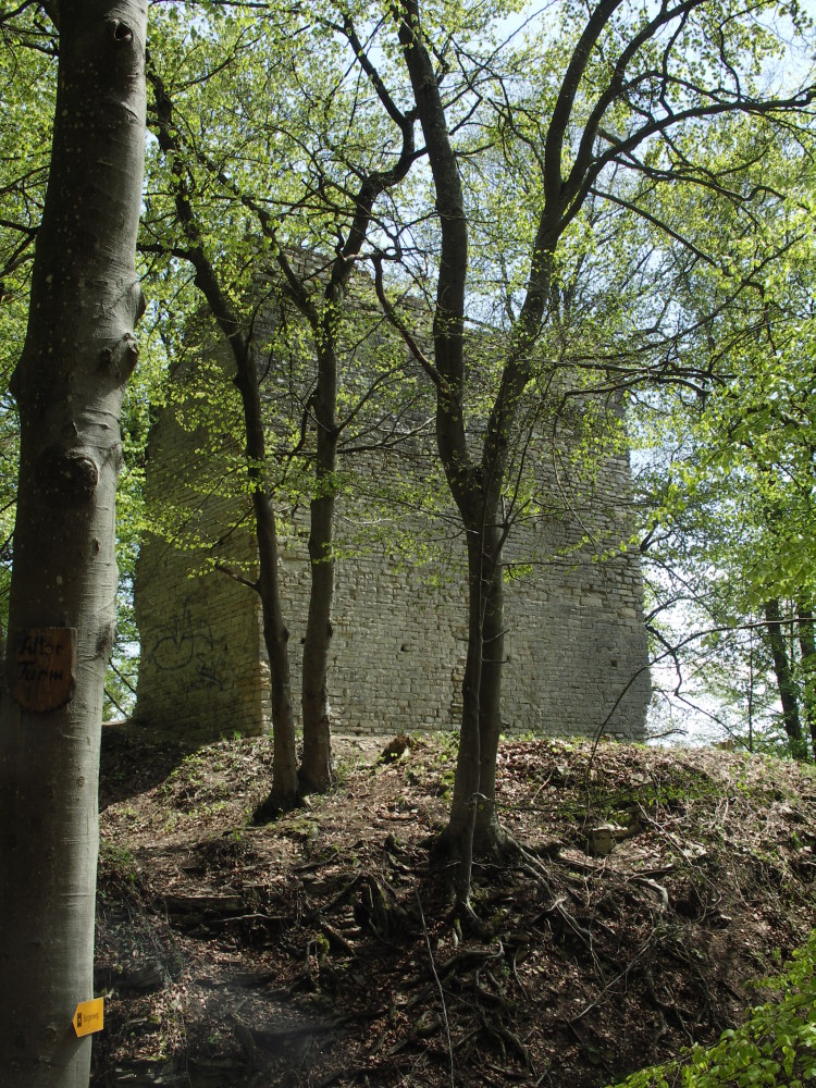 Bildbeschreibung: Alter Turm Aach Fotograf/Zeichner: Peter Schmenger Datum: 1.5.2006